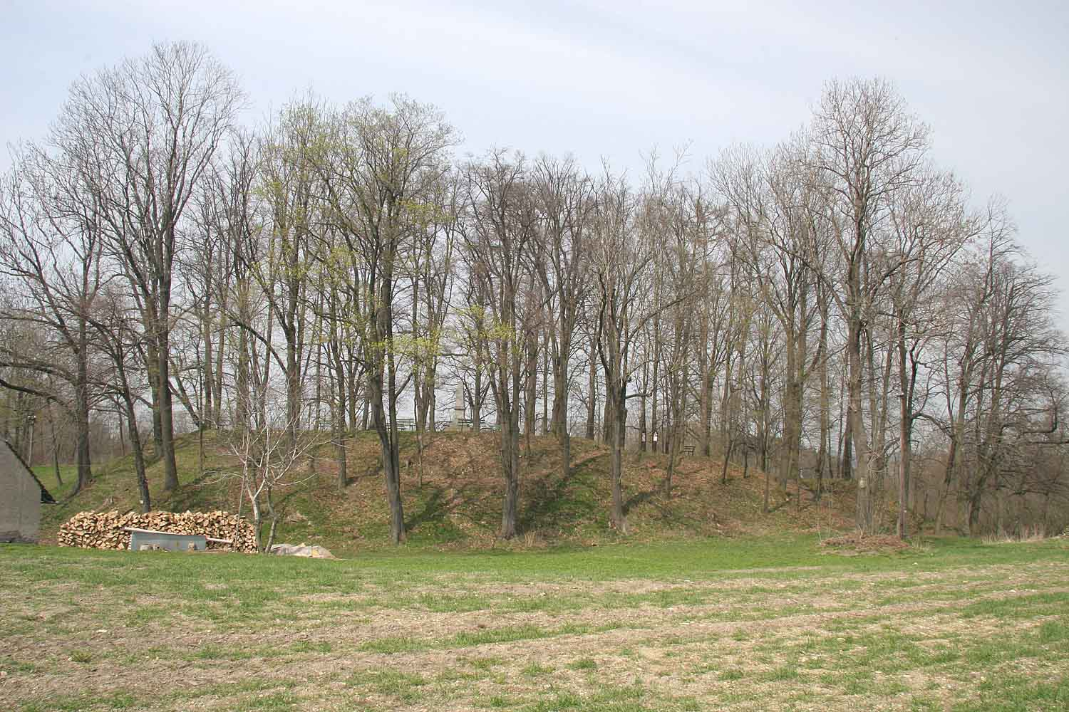 Dochovaný val hradiště Vraclav autor:Zp